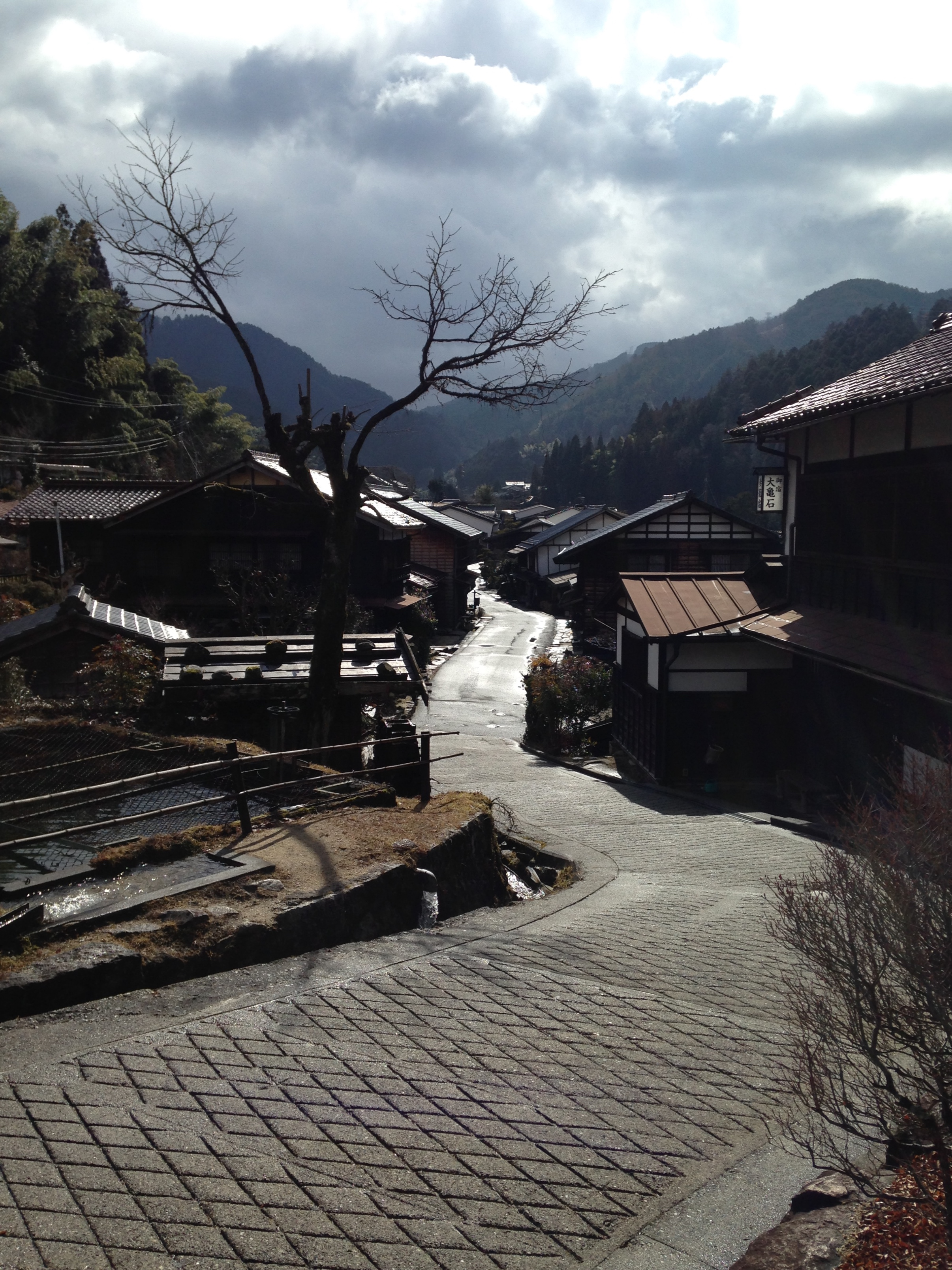 高札場から望む妻籠宿の町並み